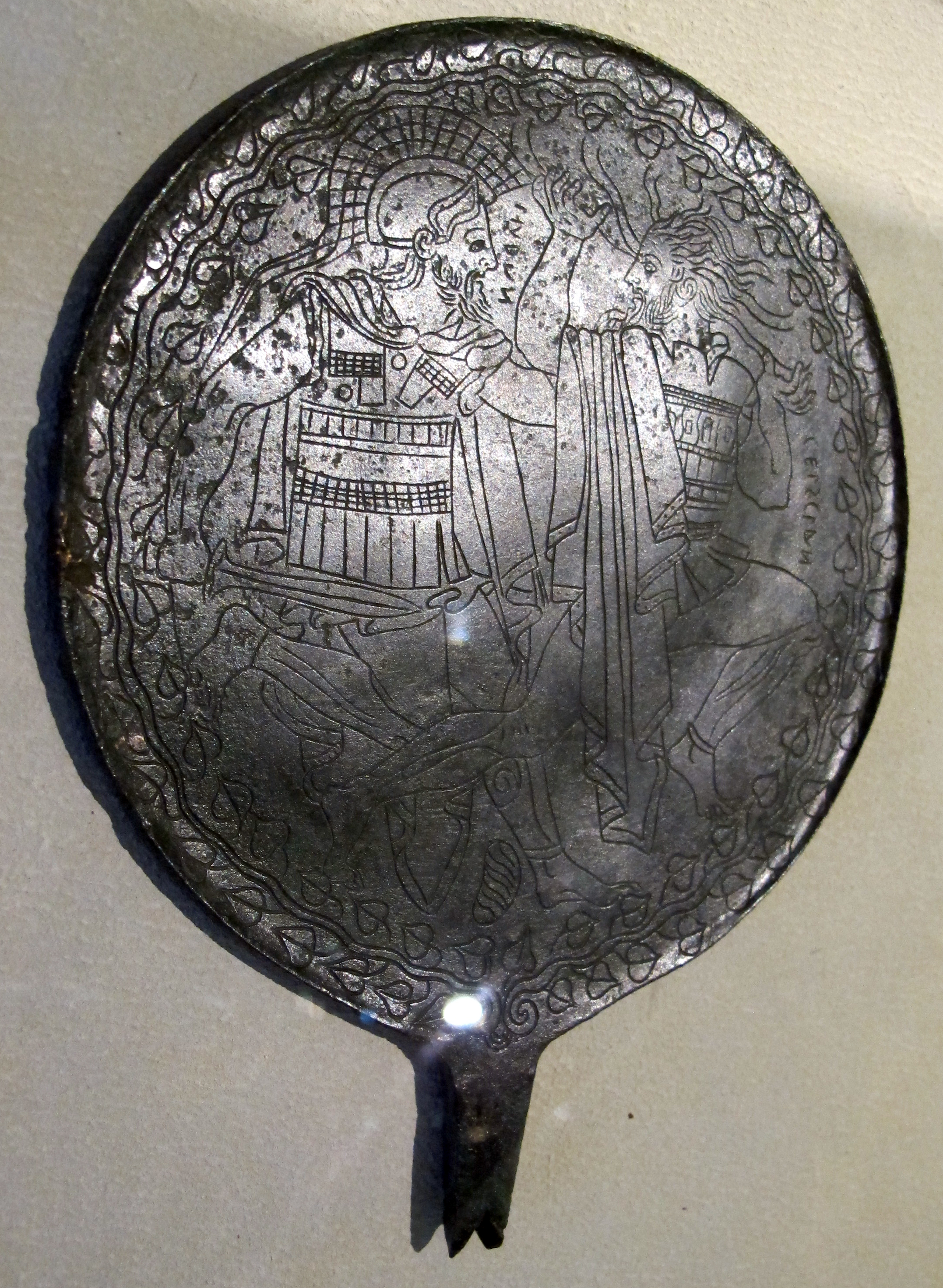 Etruscan mirrors in the Museo archeologico nazionale (Florence)